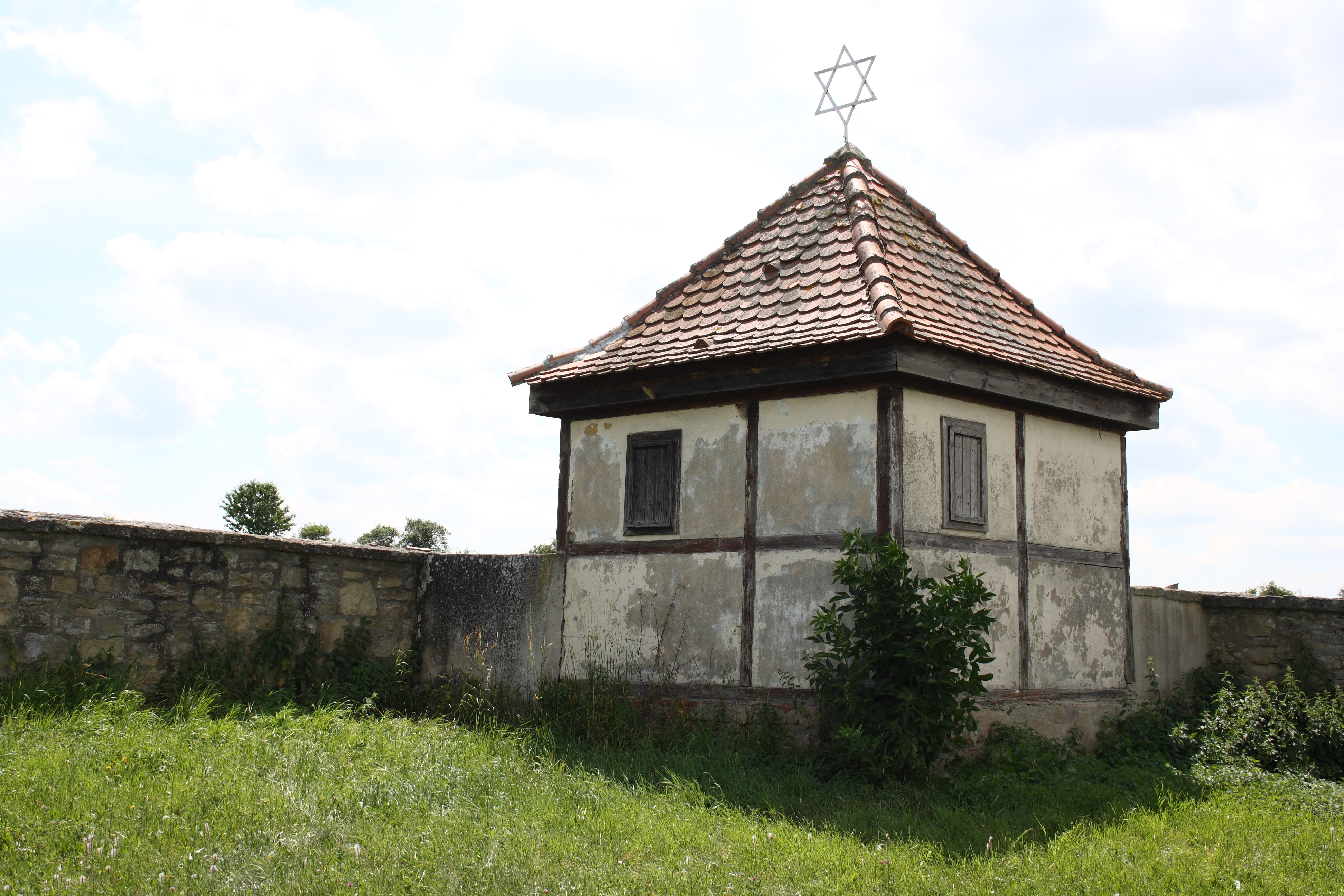 Jüdischer Friedhof in Rödelsee im Landkreis Kitzingen (Bayern)